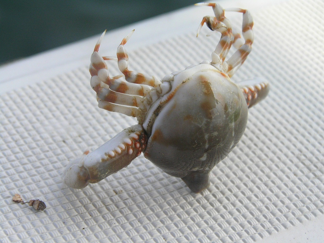 ツノナガコブシLeucosia anatum(Herbst,1783)